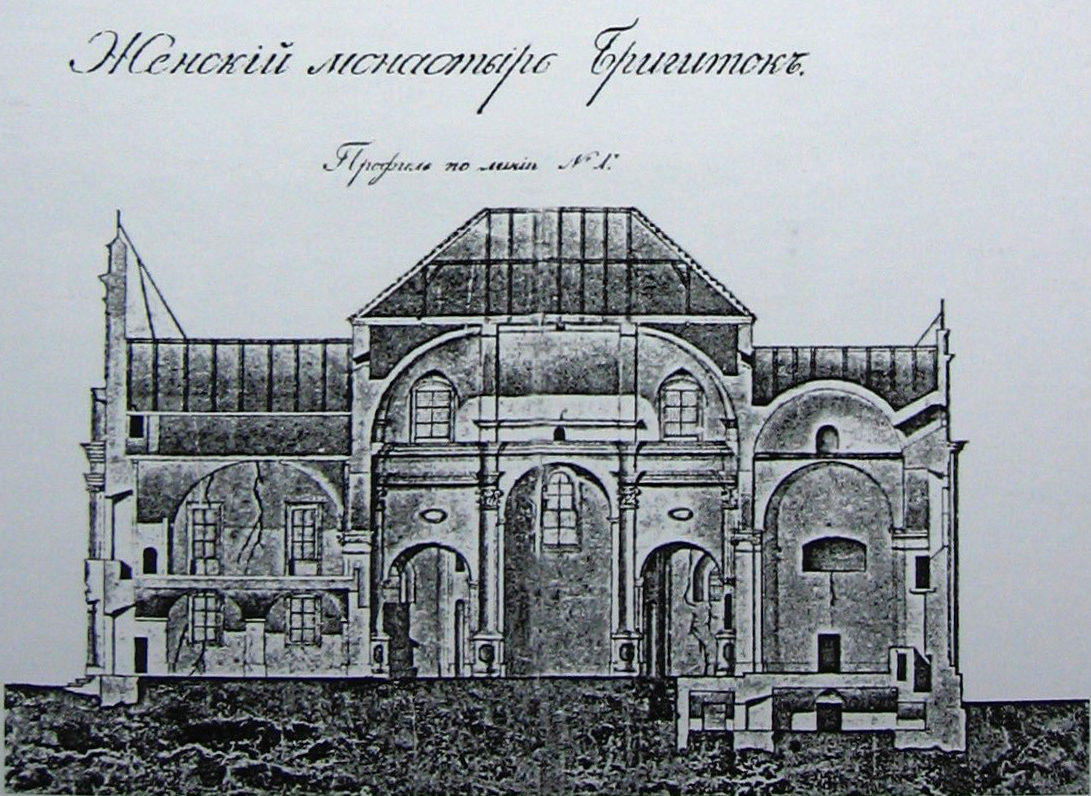 Беларуская (тарашкевіца): Берасьце (Bieraście), прадмесьце Пескі (Pieski). Касьцёл Зьвеставаньня Найсьвяцейшай Панны Марыі і кляштар брыгітак